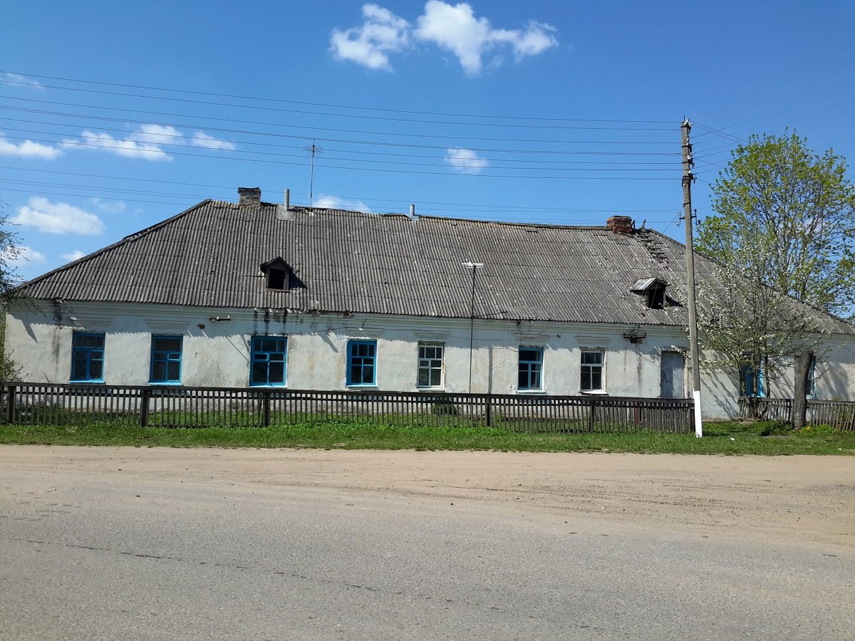 Бачэйкава. Сядзіба Цеханавецкіх. Дом для працоўных